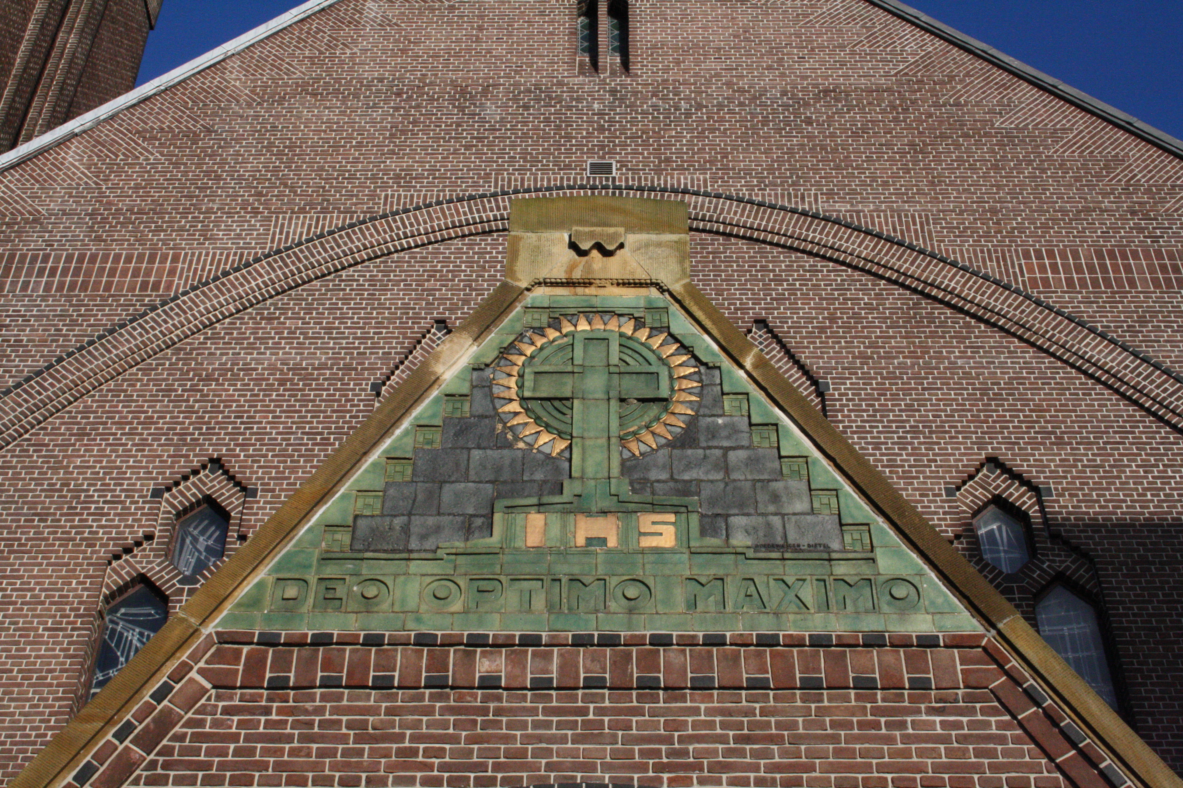 Bovenzijde van het portaal van de neo-romaanse Johannes de Doper in Grootebroek.